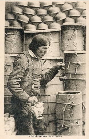 Enfournement des faïences de Quimper, début XXe siècle, France